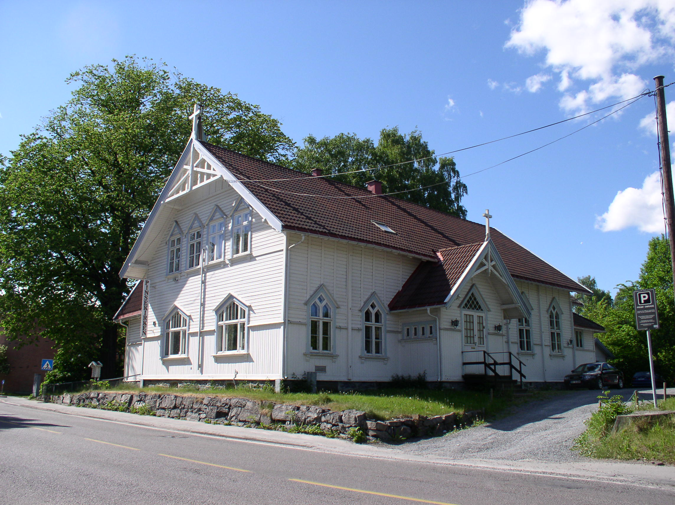 Sandvika kirke.